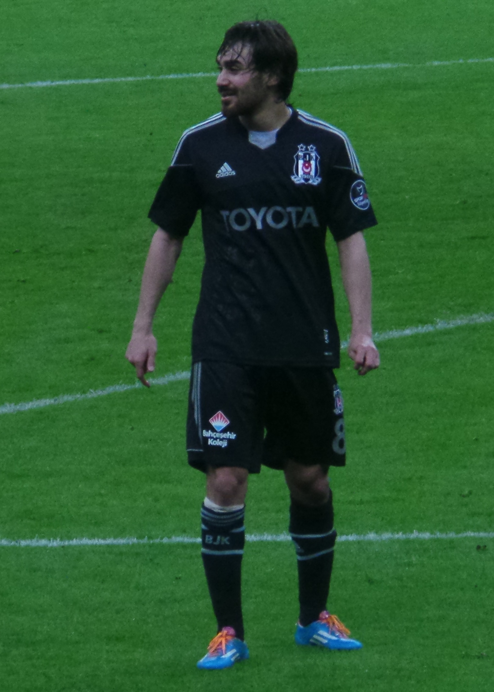 Veli Kavlak'13-14